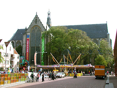 Eigen werk. Grote Kerk Alkmaar.